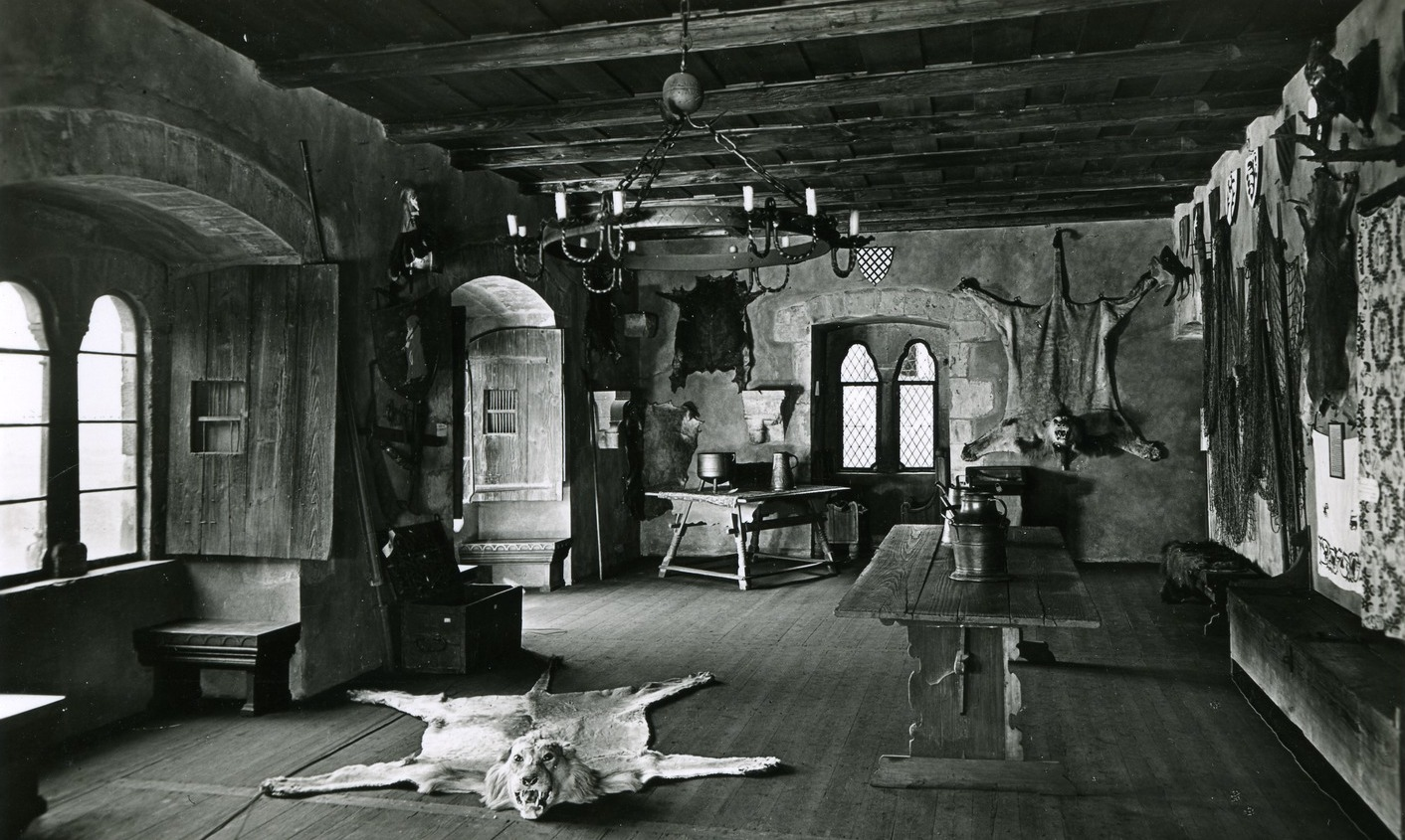 Kohren; Burg Gnandstein, Romanischer Saal This postcard is from publisher Brück & Sohn in Meißen ( postcard has a unique number 27001 and is available in a higher resolution at the publisher. This images was uploaded in a cooperation project between Wikipedians and the publisher.